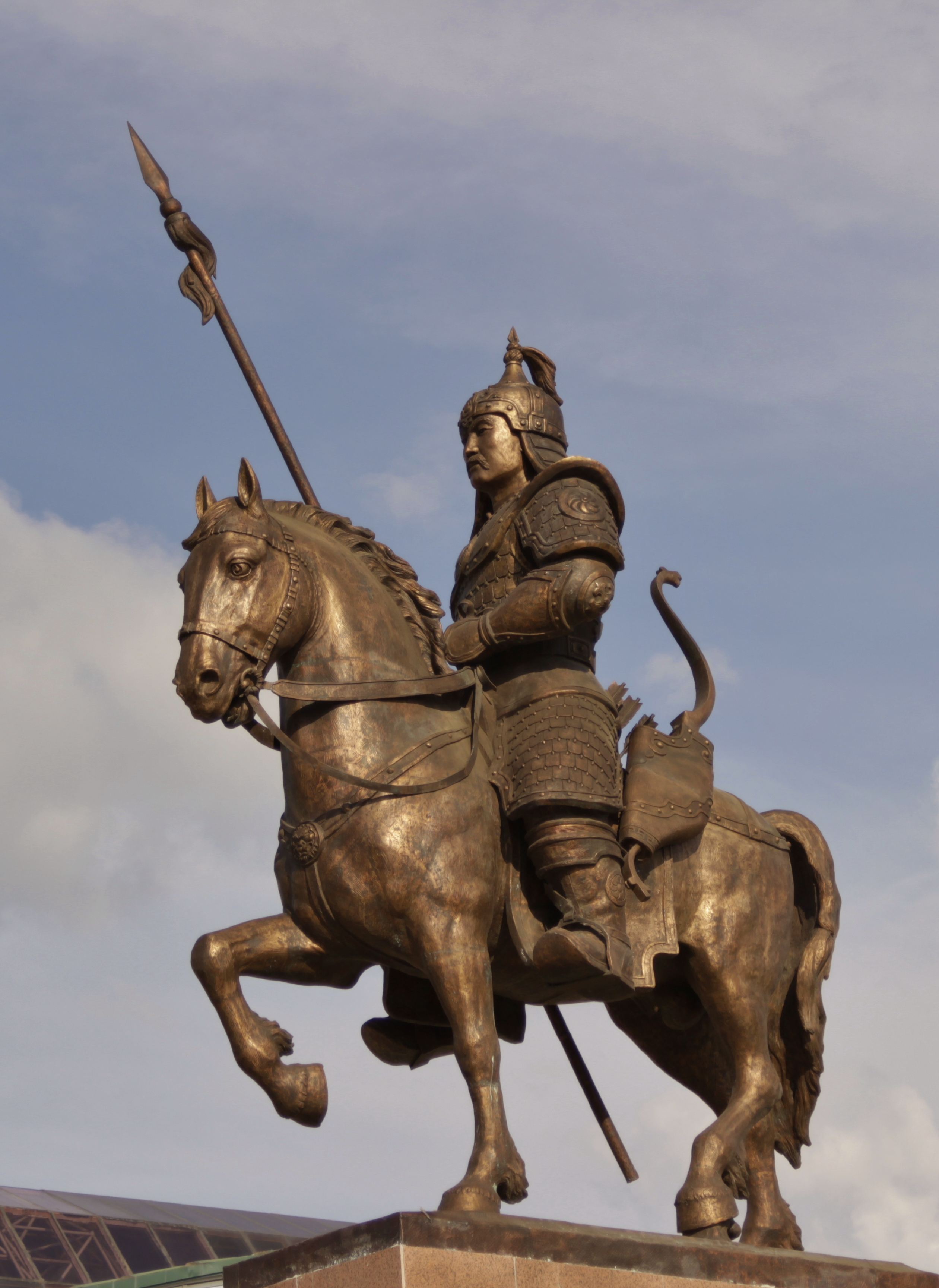 Памятник Бабжа-Барас-батору, объединителю восьми бурятских агинских родов. Пгт. Агинское, Забайкальский край